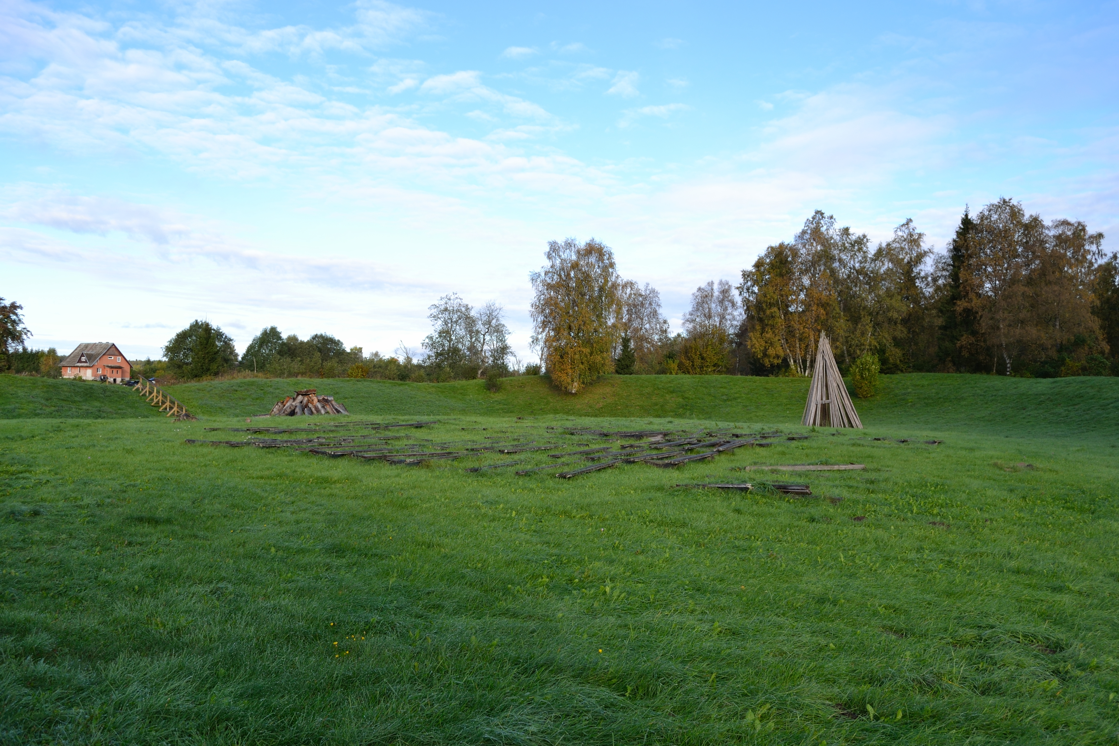 Loone linnus